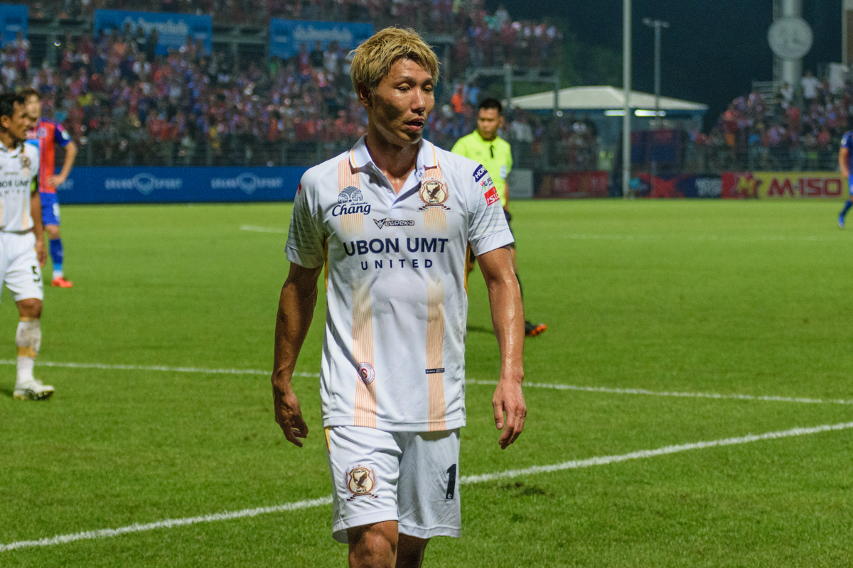 Kenta Yamazaki